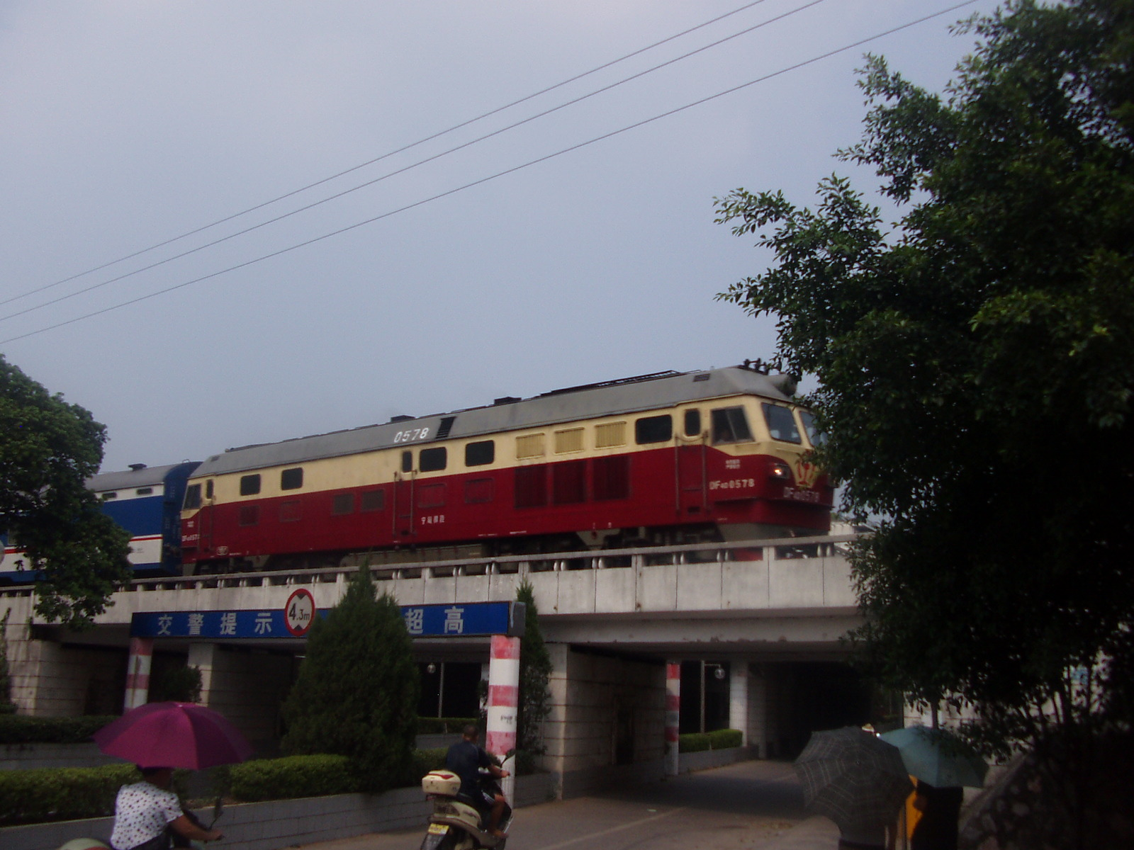 DF4D型0578号内燃机车牵引北京西到南宁T5次经过西山公园铁路桥